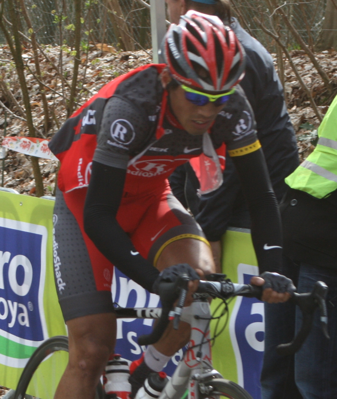 Fuyu Li au mont Kemmel, lors de Gand-Wevelgem 2010